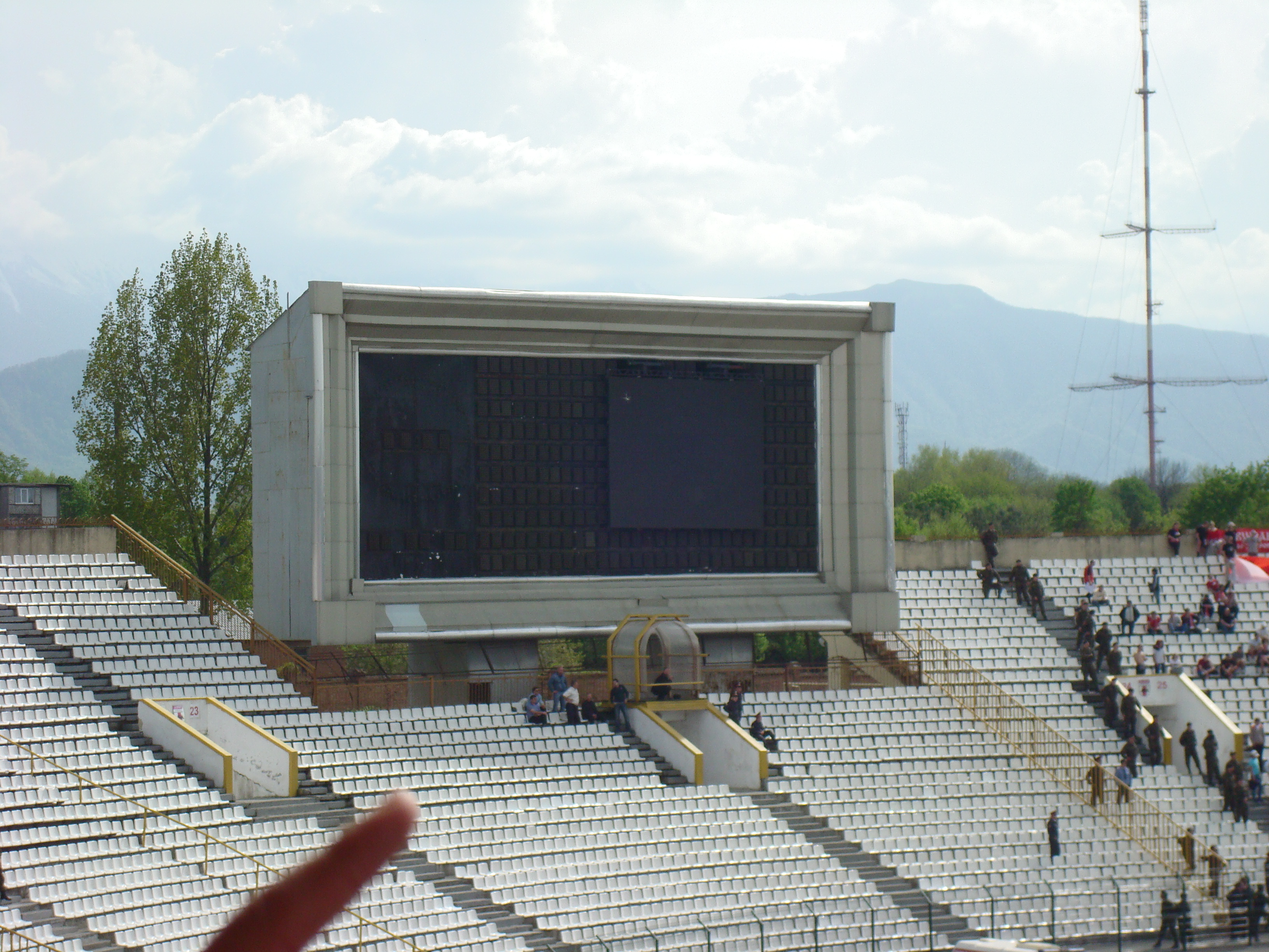 Табло республиканского стадиона "Спартак" во Владикавказе